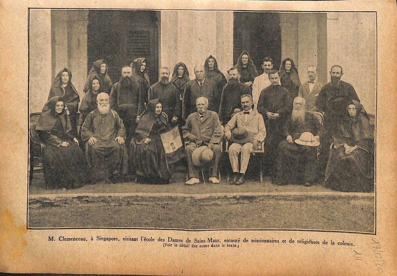 L'Illustration 1920, Georges Clemenceau en visite chez les dames de Saint-Maurice à Singapour en présence des missionnaires de la colonie.